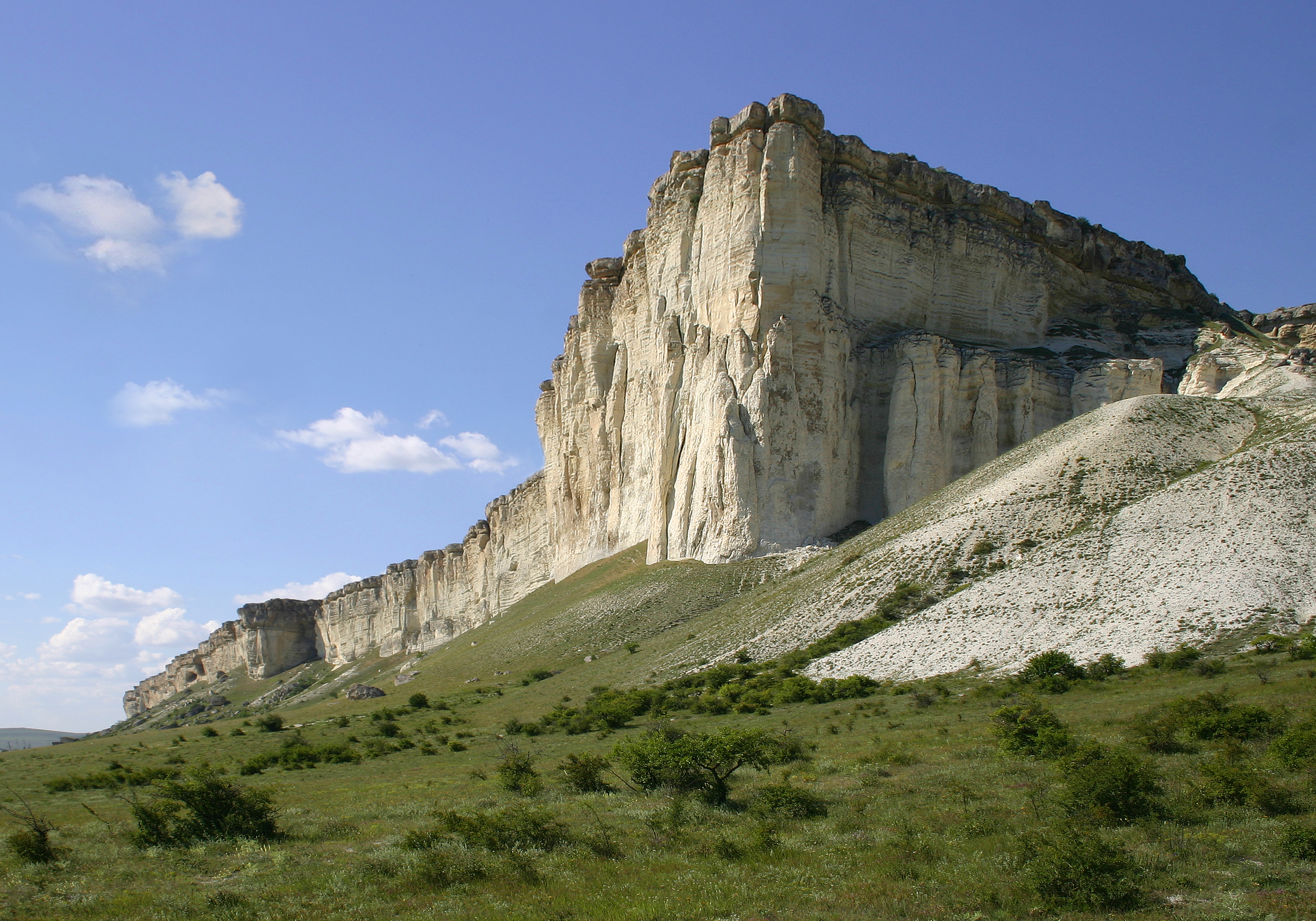 Ак-Кая_2 Білогірськ (Крим)